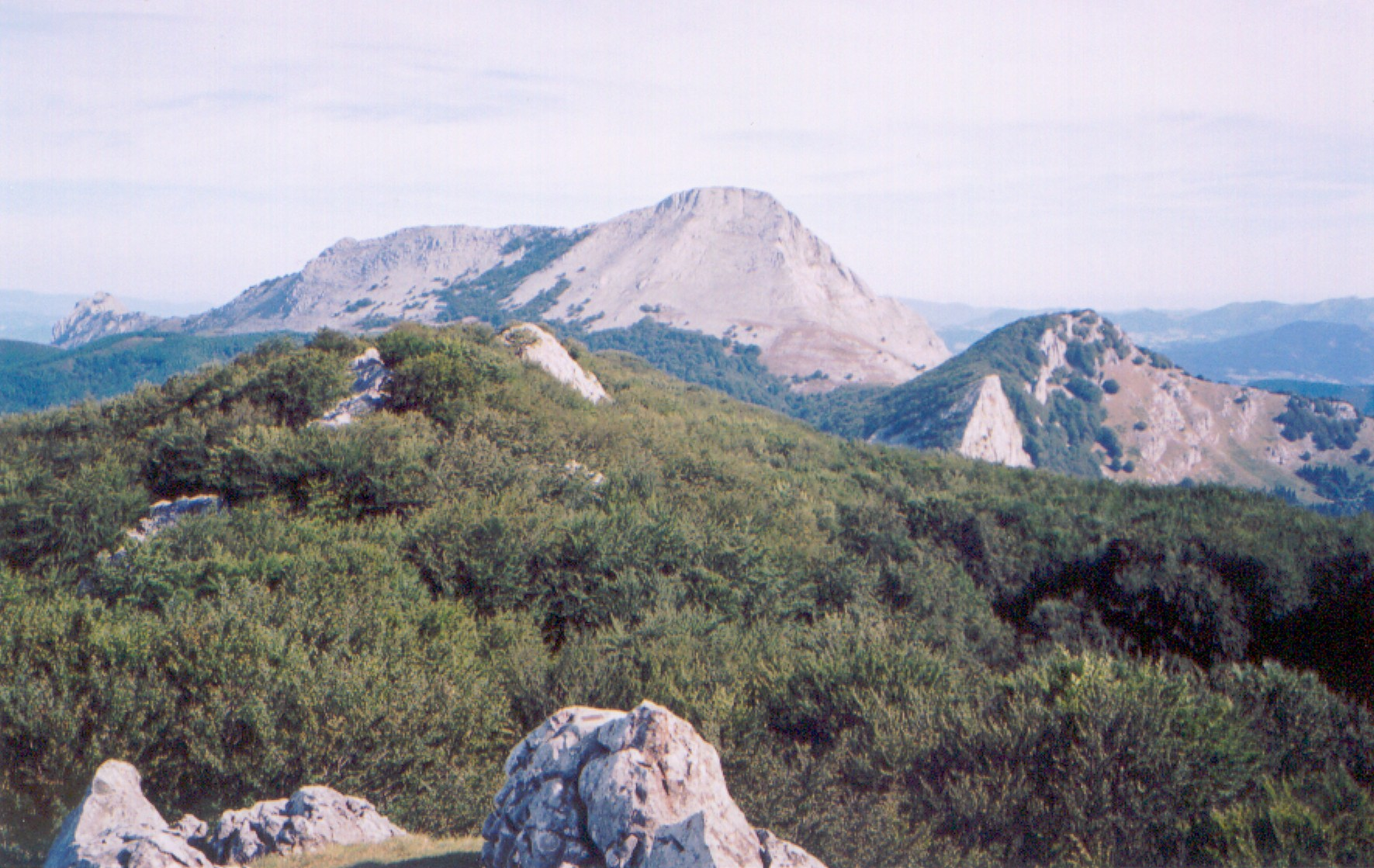 Monte Amboto, País Vasco (visto desde el Orisol) Taken by myself. --Ardo Beltz 22:08, 15 Feb 2005 (UTC)